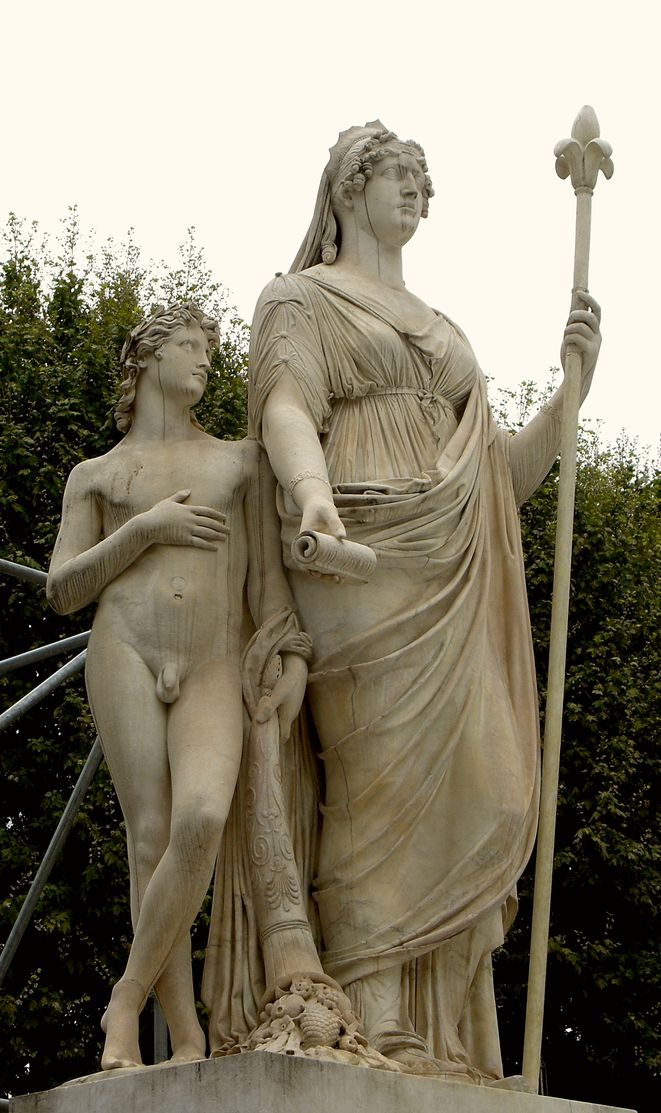 Denkmal Maria Luigia di Lucca in Lucca